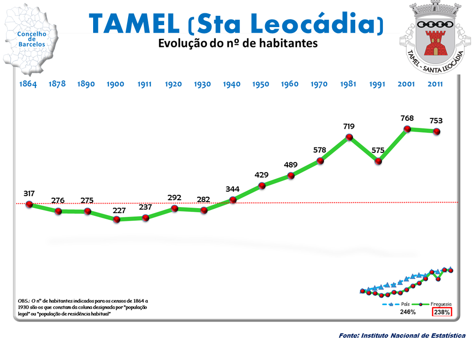 Censos 1864/2011